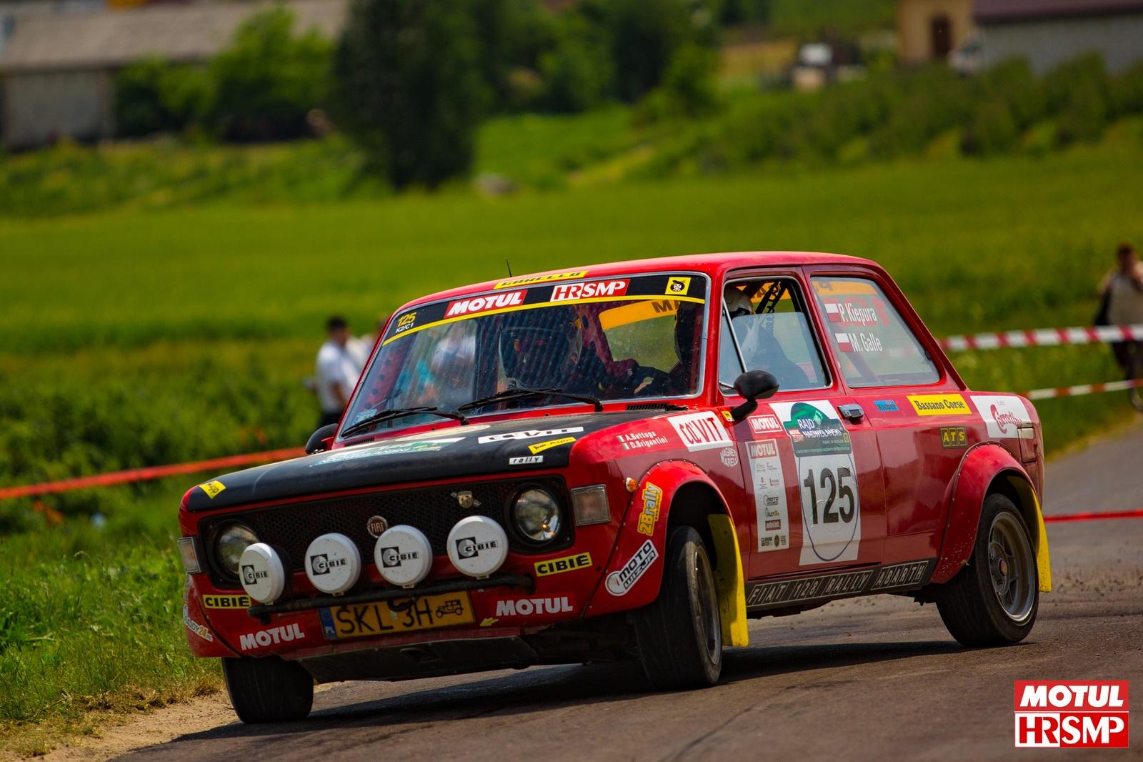 Piotr Zaleski -Jacek Gruszczyński Porsche 911 SC RS Rajd Nadwislanski HRSMP 2018